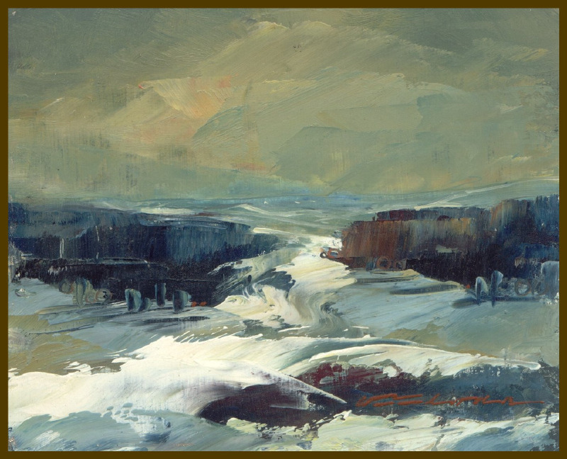 Stanislav Příhoda